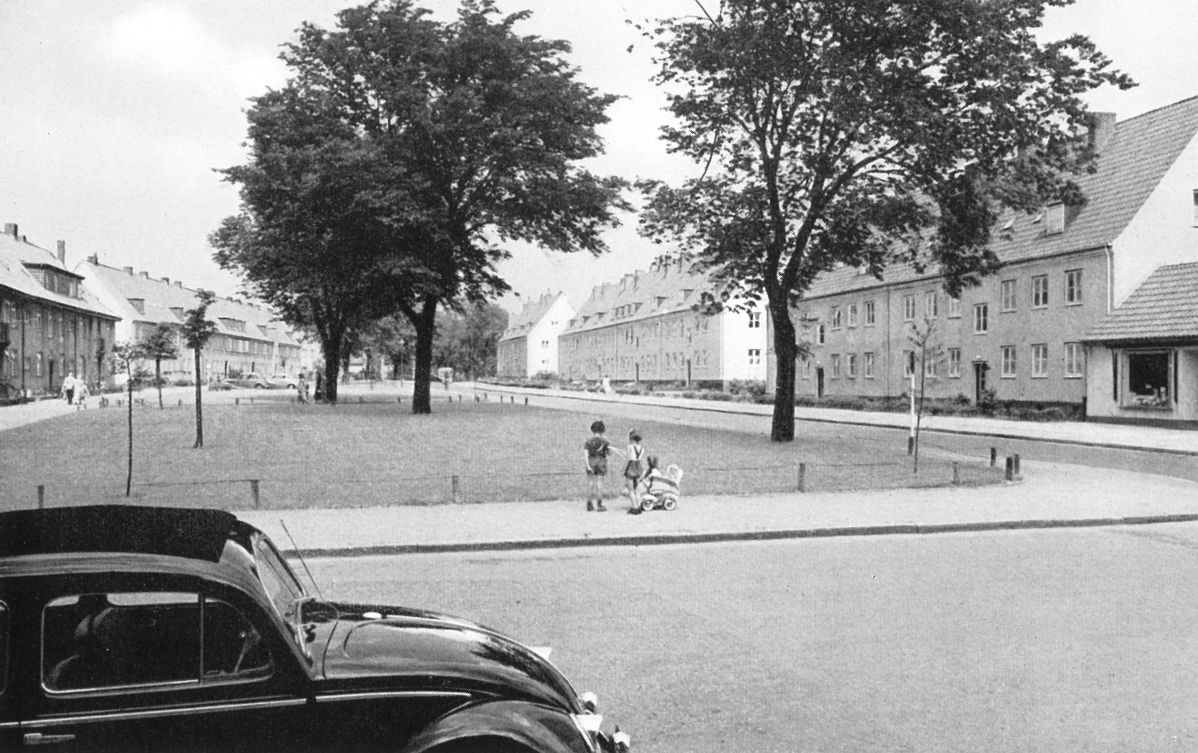 ERP Siedlung Flensburg Fruerlund (Standort Glücksburger Straße; der Bereich ist dem Stadtteil Jürgensby (nicht Fruerlund) zugeordnet)